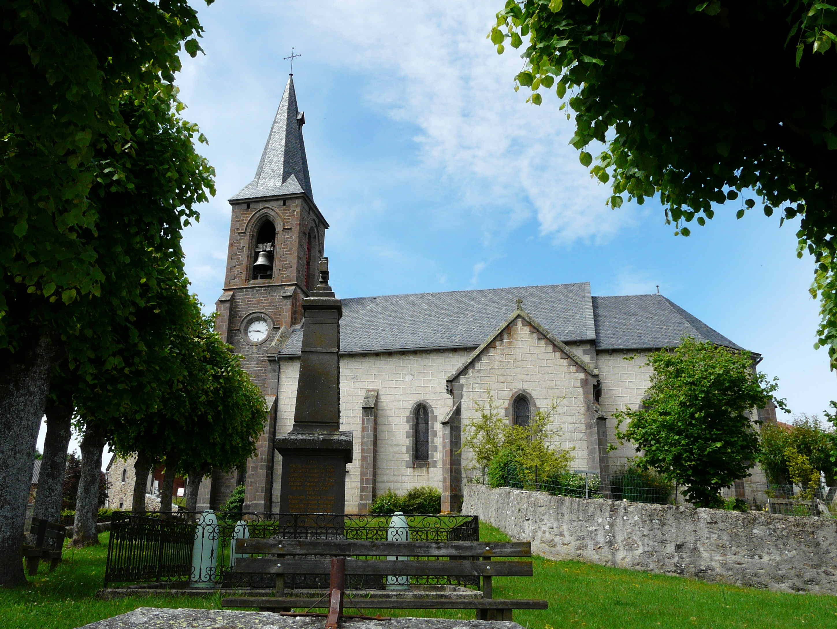 Le monument aux morts et l'église, Anglards-de-Saint-Flour, Cantal, France.